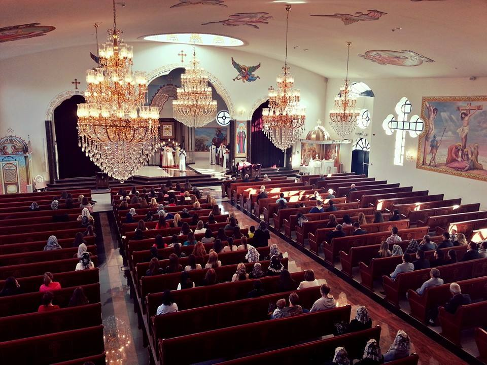 Inre vy av S:t Jacob av Nsibin Syrisk Ortodoxa Katedral i Södertälje.